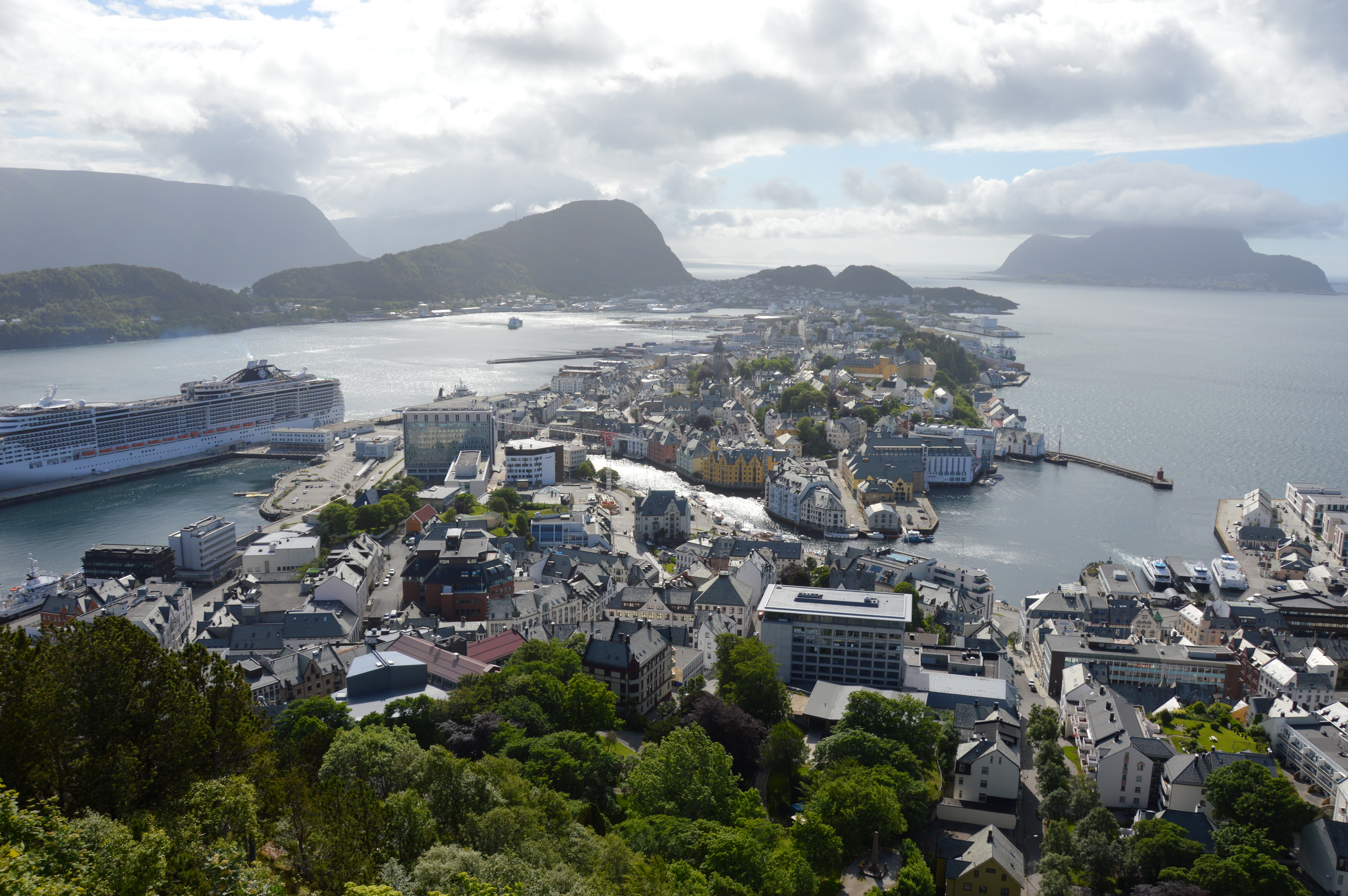 Blick vom Aksla auf Alesund